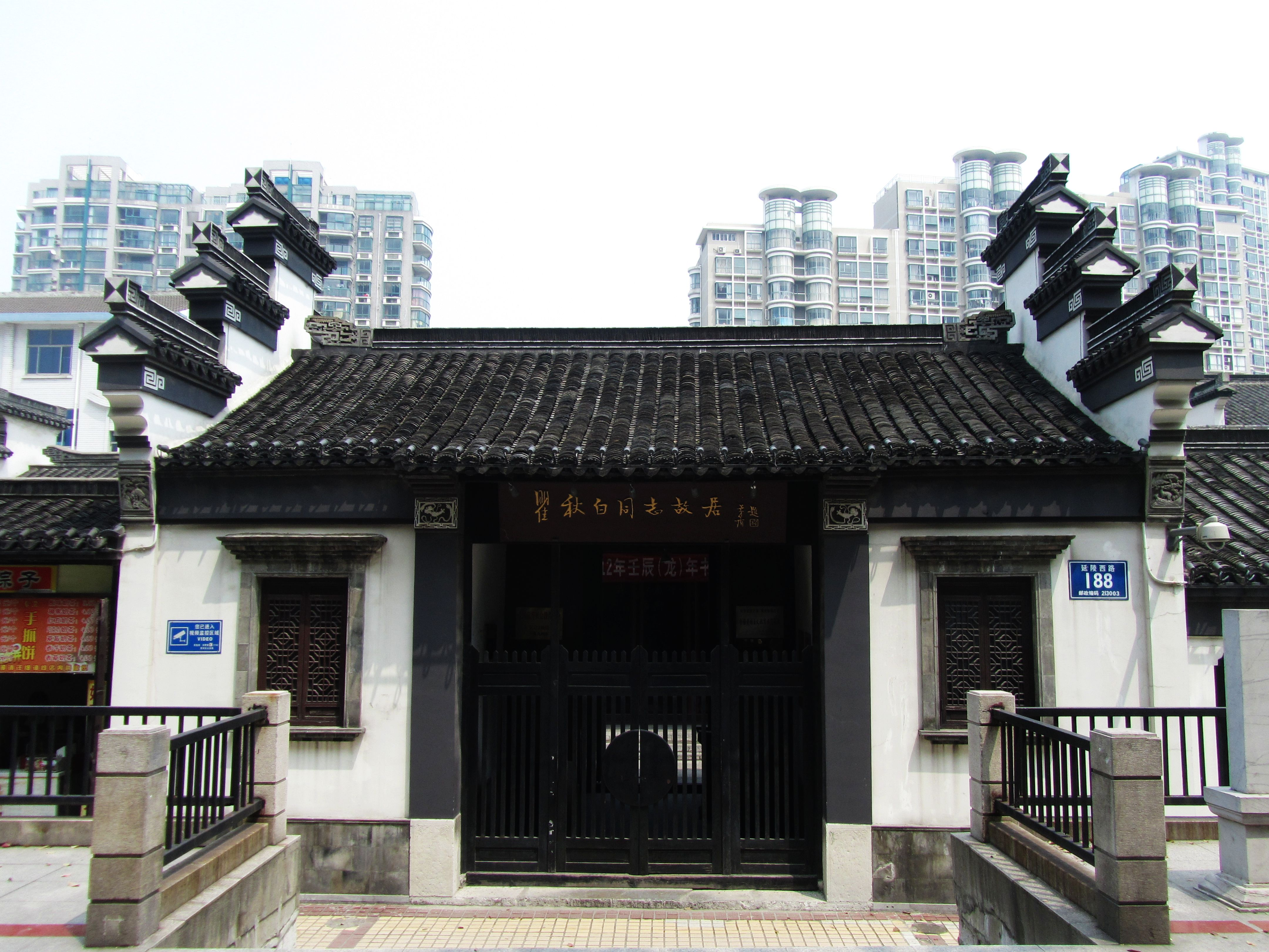 瞿秋白故居之瞿氏宗祠，自南侧看。